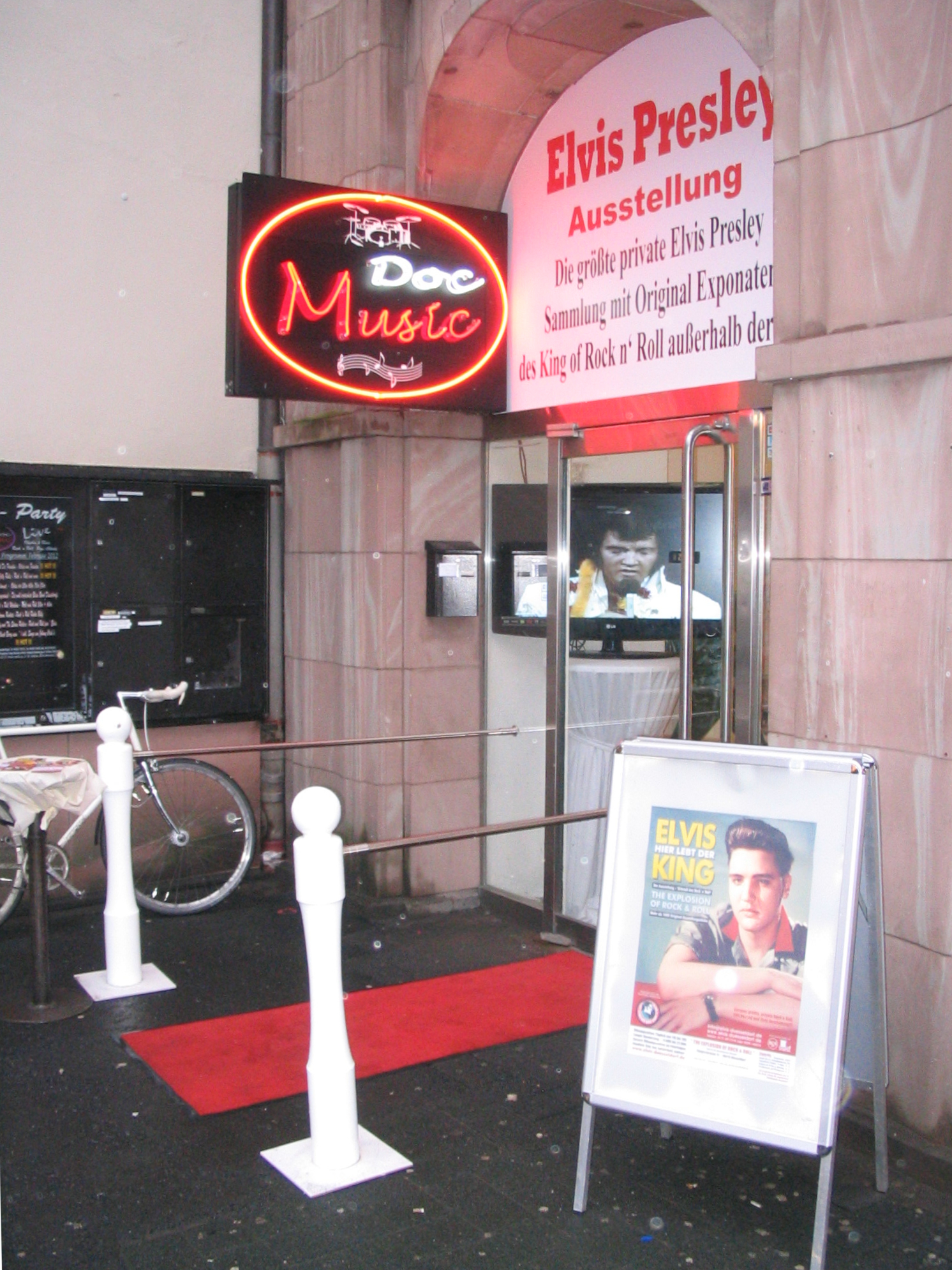 Düsseldorf, Flinger Straße Elvis Presley Ausstellung, eröffnet im Dezember 2011